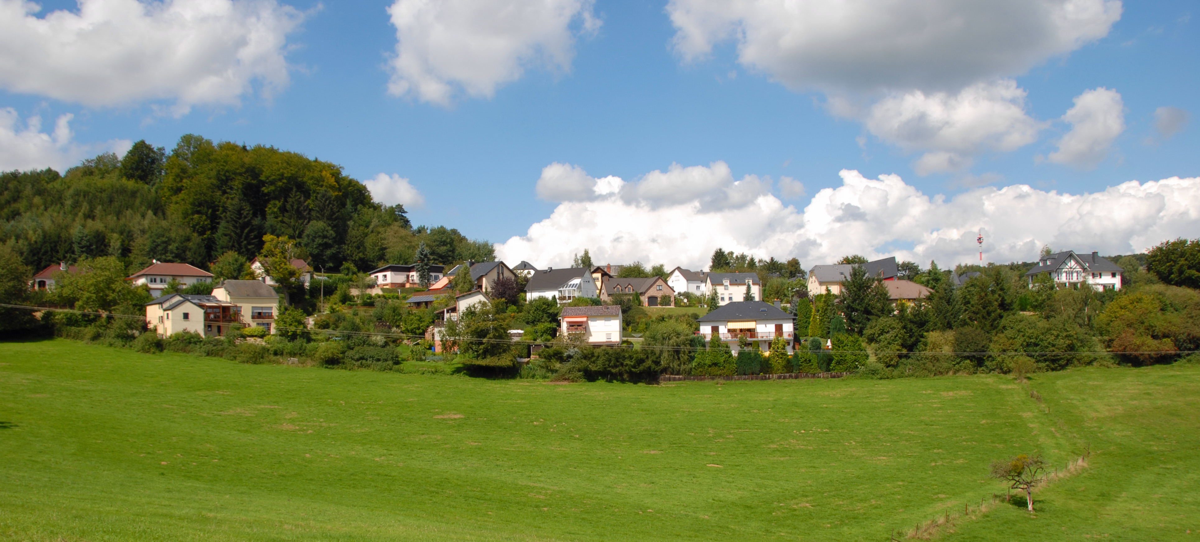 Vue op Blaaschent.